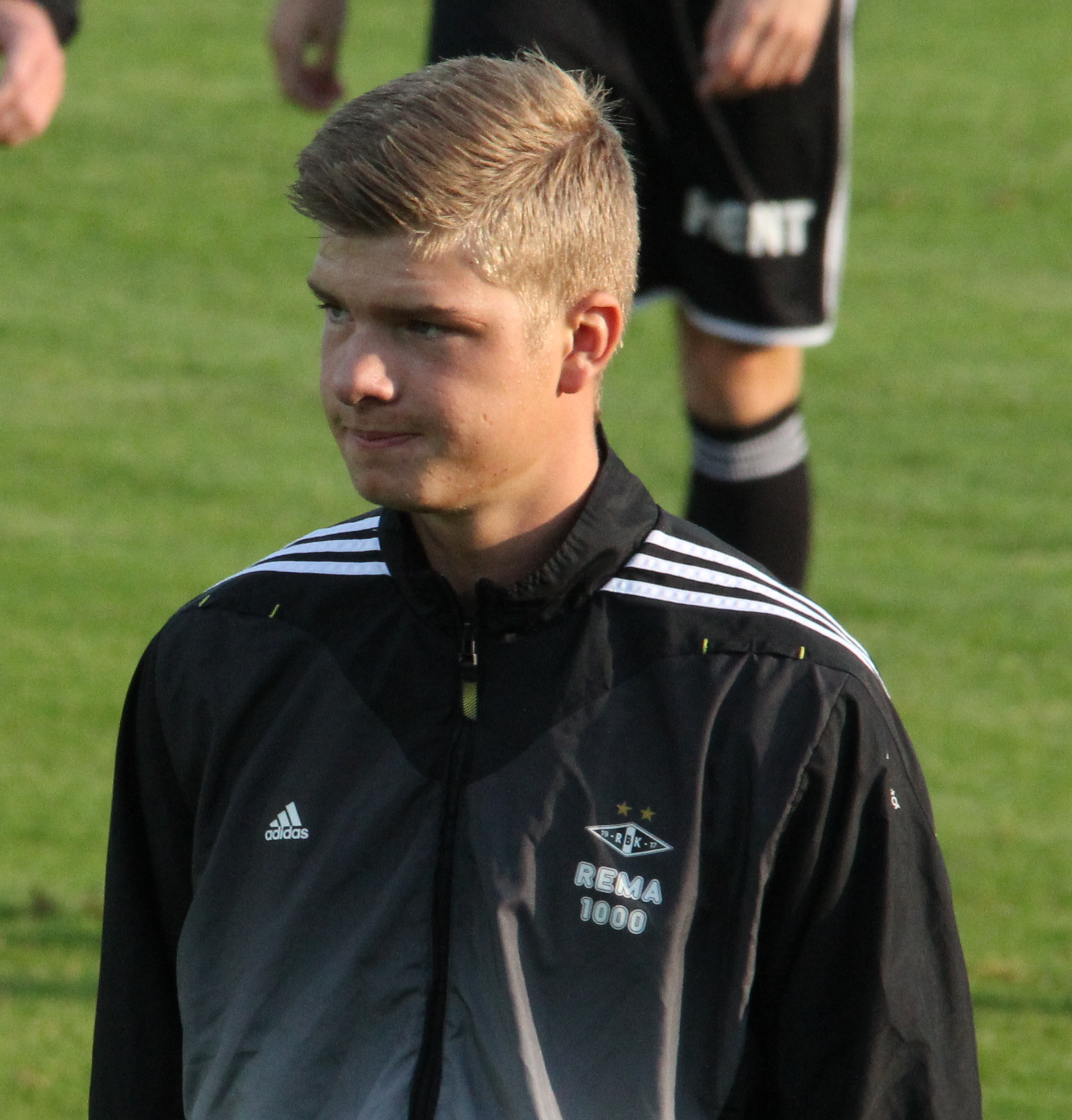 Alexander Sørloth på Sandnes stadion 25. august 2013